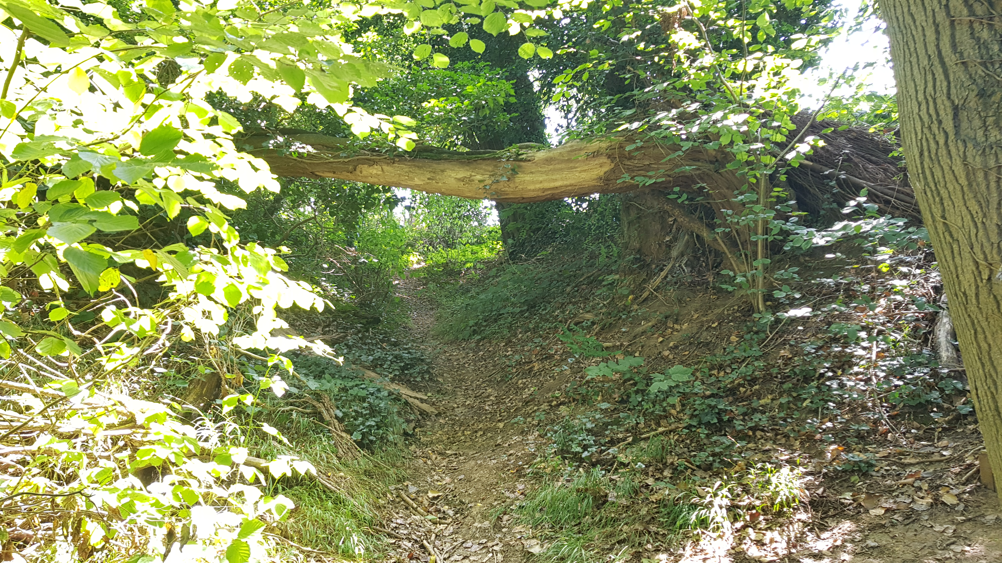 boom over pad in Bemelerbos, Bemelen, Nederland